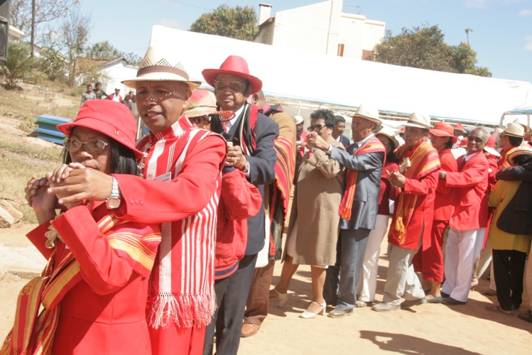 alamady 4